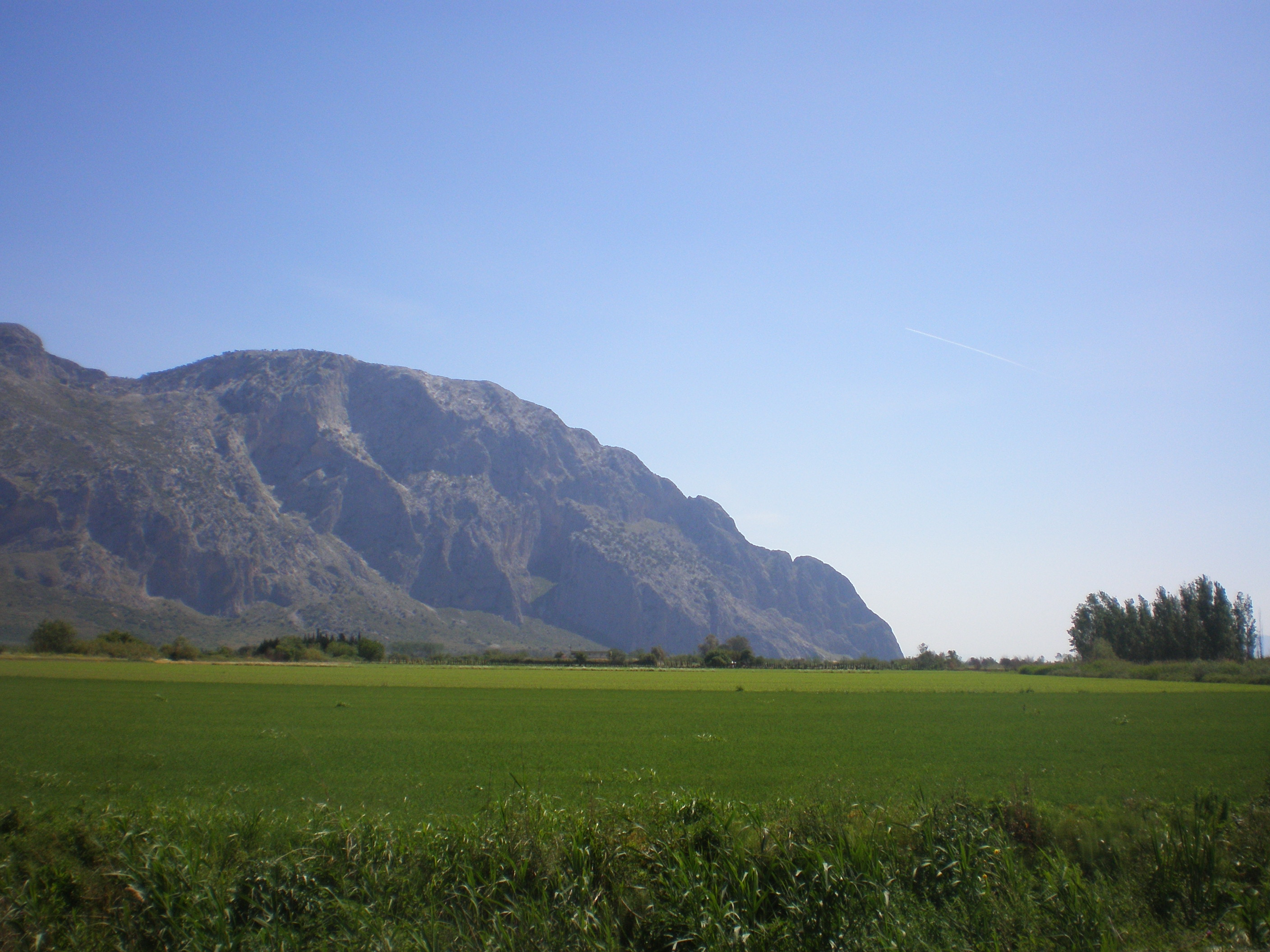 Άποψη του νοτίου τμήματος της Βαράσοβας από τον κάμπο των εκβολών του Ευήνου. This is a photography of Natura 2000 protected area with ID GR2310005